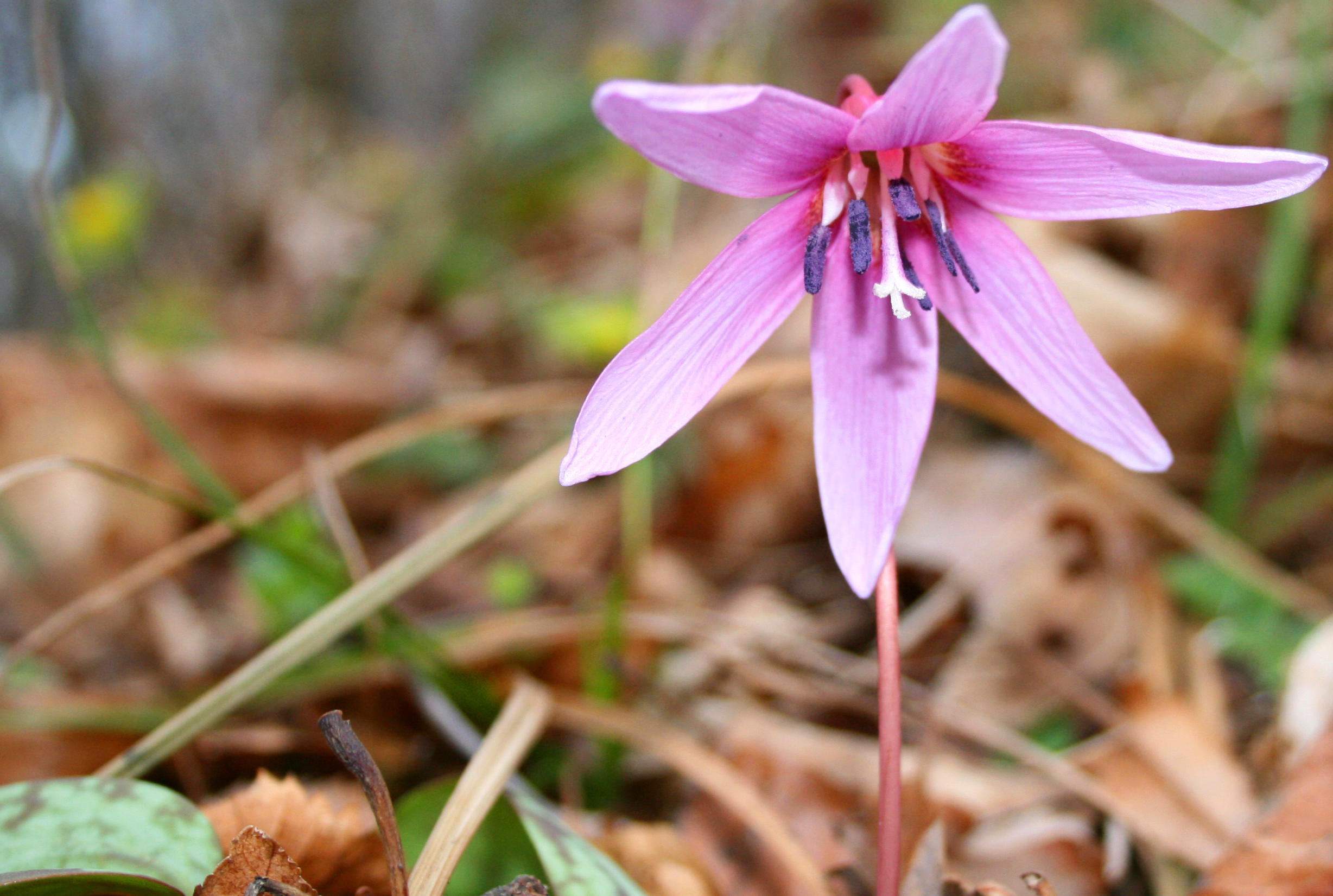 Pasji zub (Erythronium dens canis), biljni svijet Medvednice, Zagreb, Hrvatska